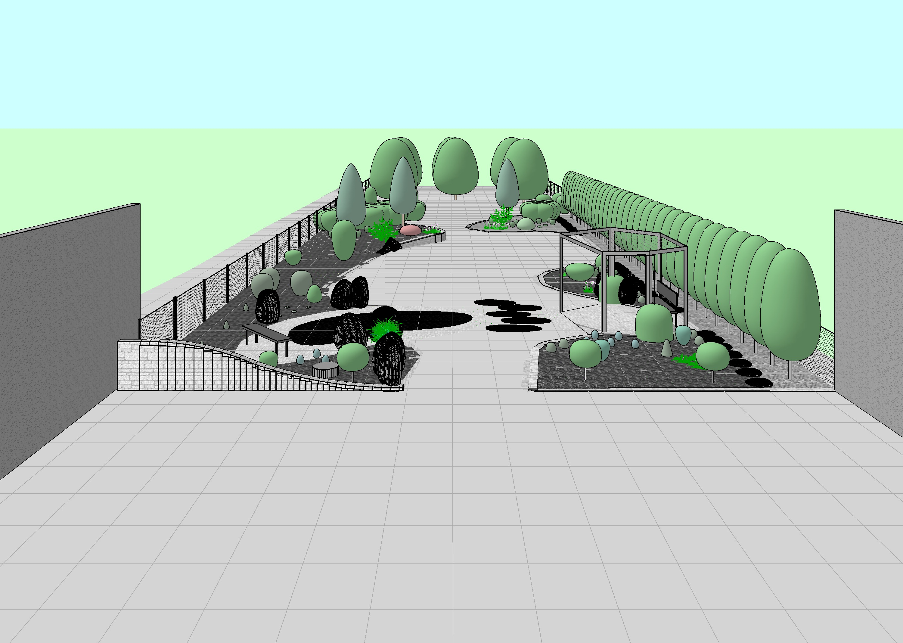 Sadovnická projekce je CAD software původně vyvíjený v ČR původně pro DOS Karlem Rysem ve spolupráci s Českou zahradnickou akademií Mělník.